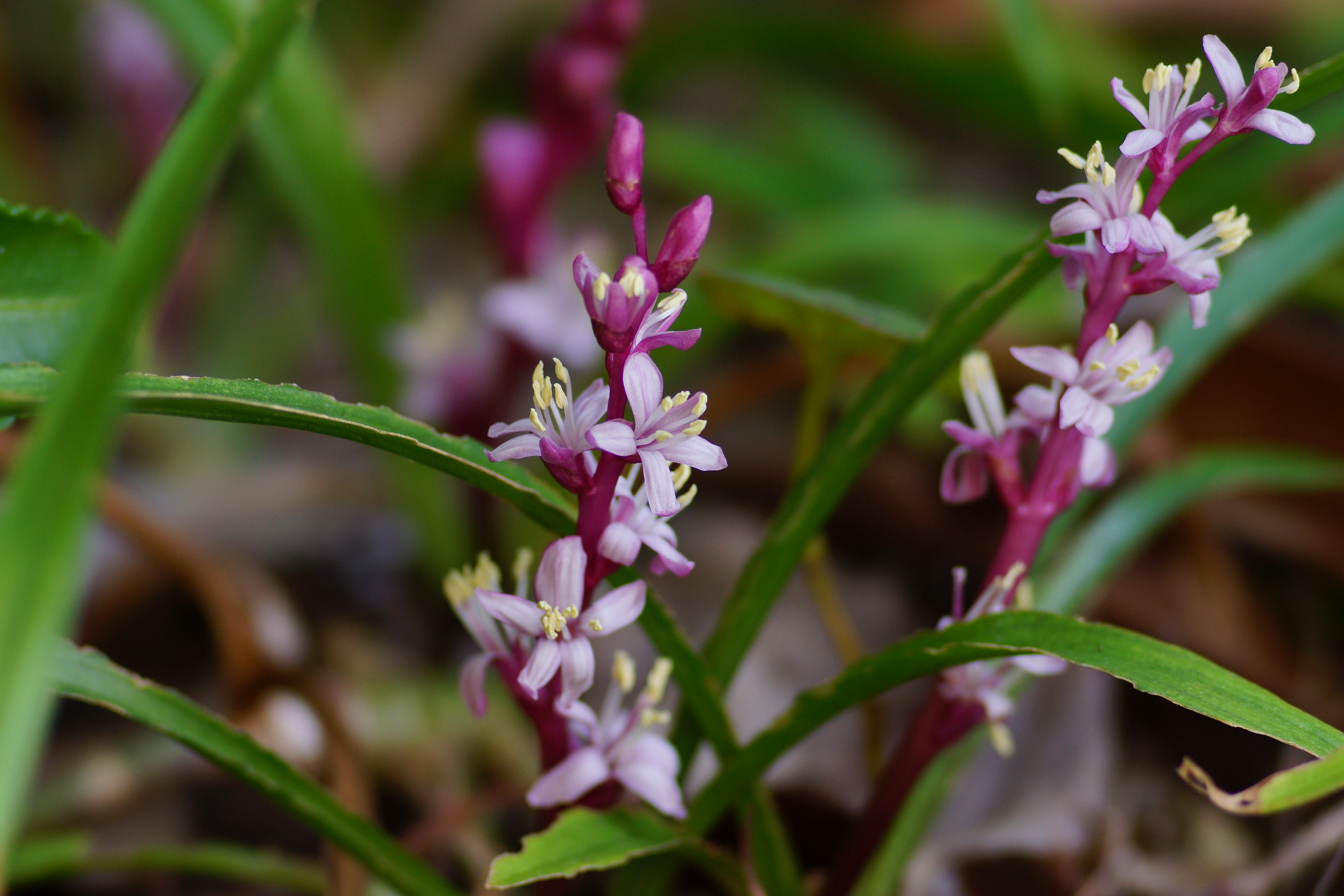 この花は毎年我が家の庭で咲いてくれます。晩秋から初冬にかけてかわいらしい小さな花をたくさん着けます。